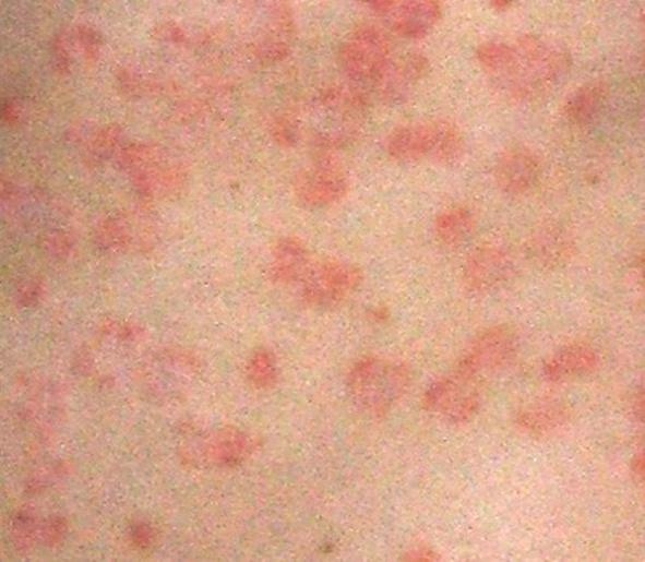 Psoriasisplaque kleinflaechig